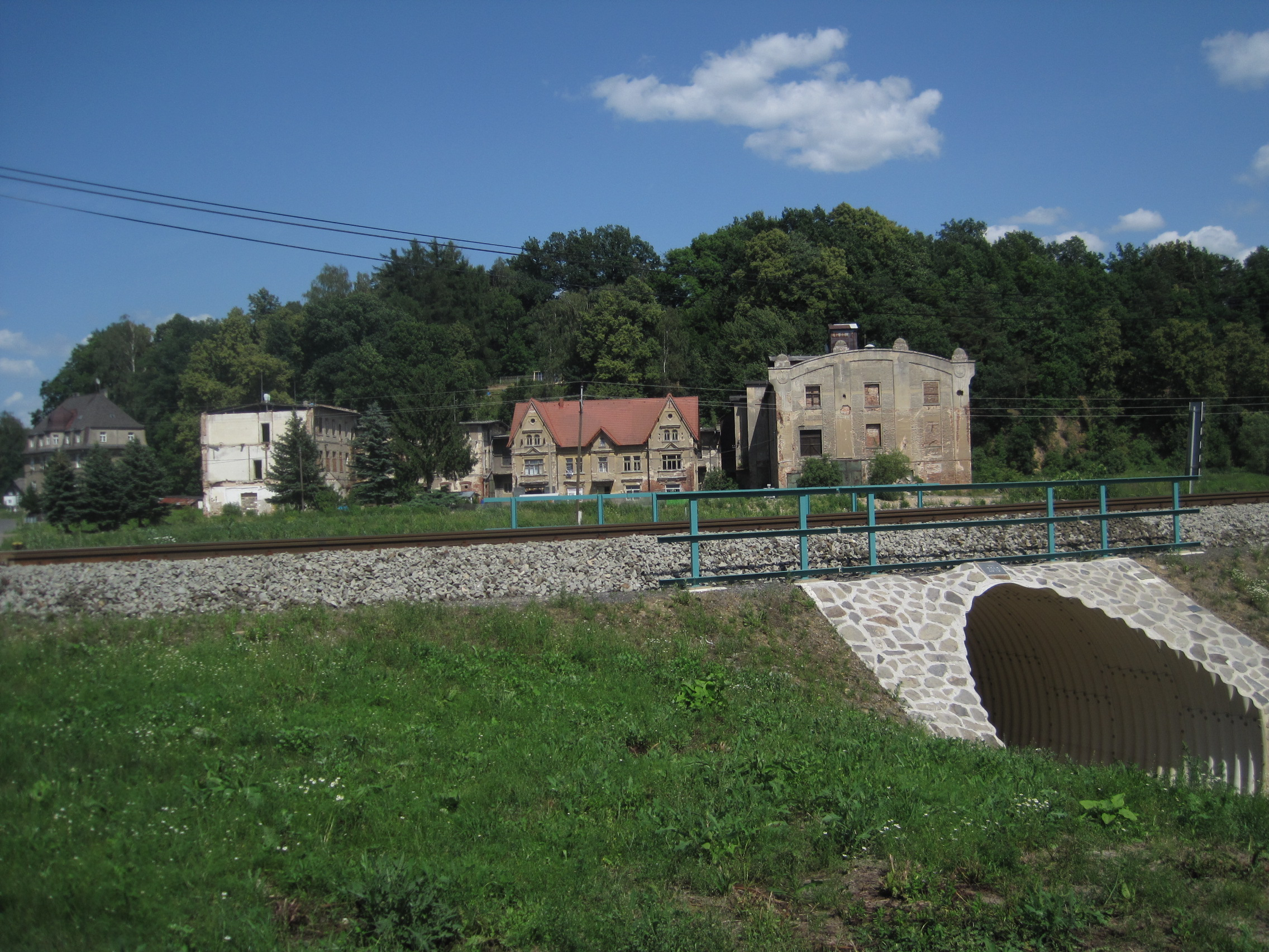 Poustka (Wustung) - stará továrna a obytné domy čp. 26 a 78 na JZ vsi